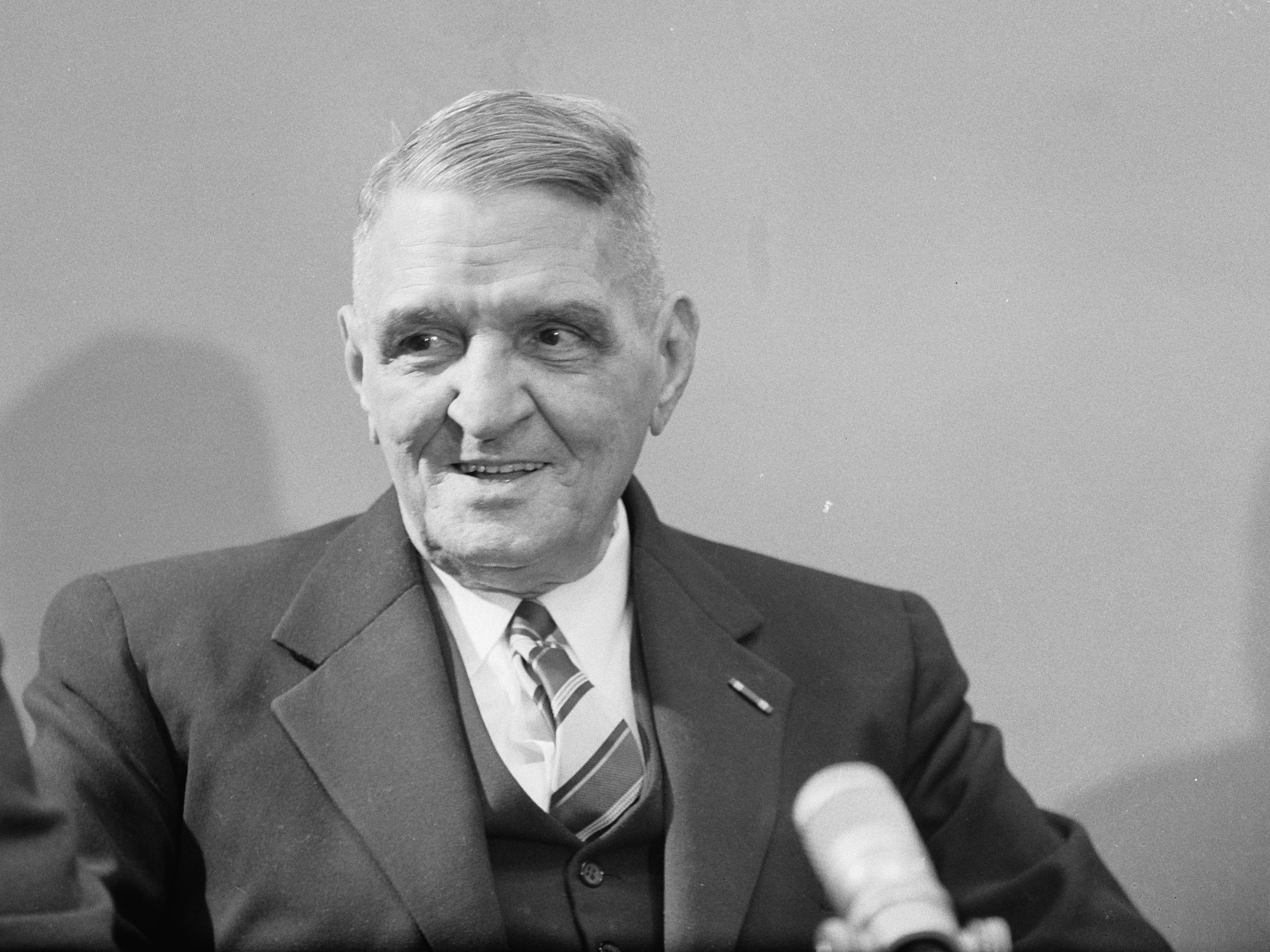 Archibald Currie Gouverneur Suriname